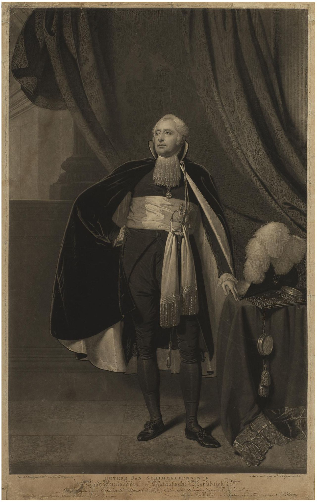 Portrait of the Dutch statesman Rutger Jan Schimmelpenninck (1761-1825 Impressum: "Rutger Jan Schimmelpenninck, Raad Pensionaris der Bataafsche Republiek Vervaardiger Charles Howard Hodges ImpressumNaar het leven geschilderd door C.H. Hodges. 1805. en door denzelven gegrav. en Uitgegeven, 1806. Amsterdam op de Prinsengracht over het Aalmoeseniers Weeshuis, N° 205." Beeldformaat677x414 mm Techniek: Mezzotint Diepdruk - handmatig De scheuren in het papier en tal van storende vlekken en slijtages zijn door de oplader, Robert Prummel, digitaal weggewerkt.